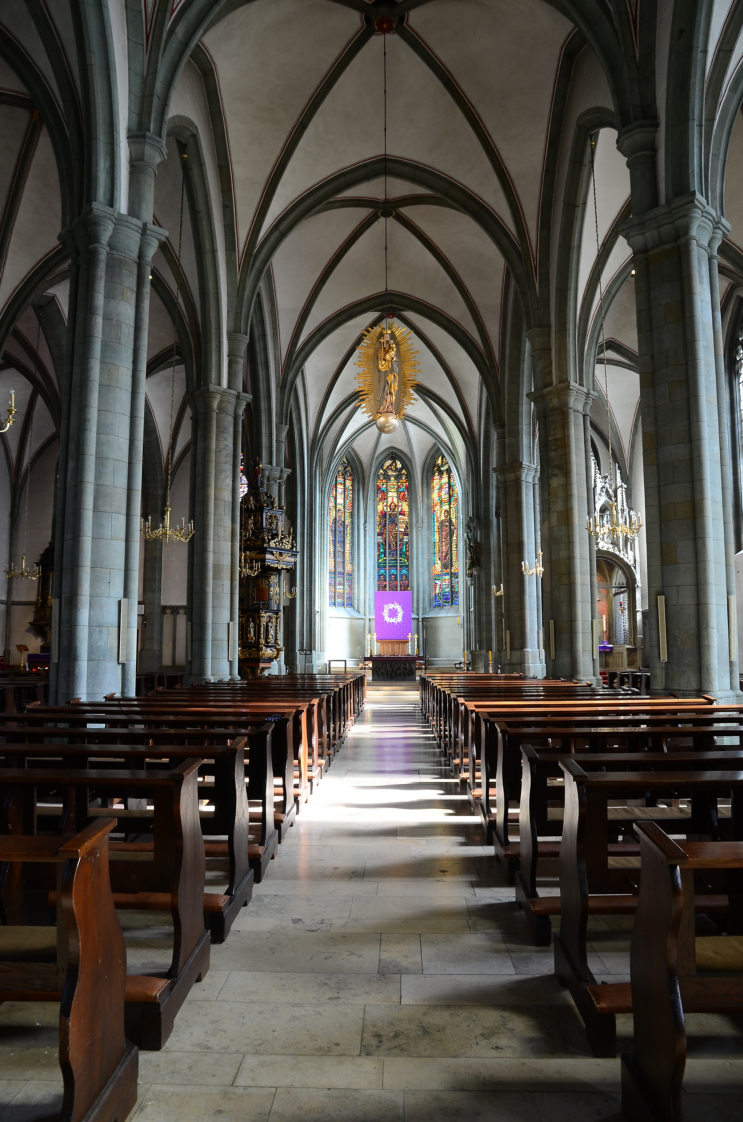 denkmalgeschützte Propsteikirche, Blick durch das Schiff auf den Chorraum